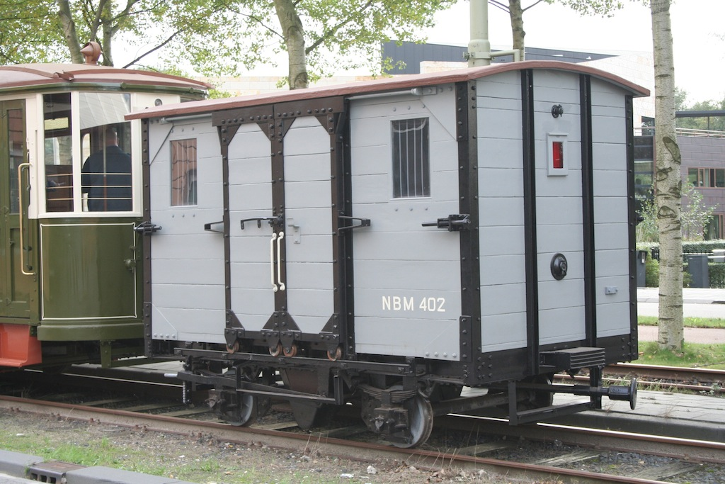 Goederenwagen "NBM 402" op de Electrische Museumtramlijn Amsterdam, halte Jollenpad; 29 oktober 2006. Foto: Erik Swierstra.